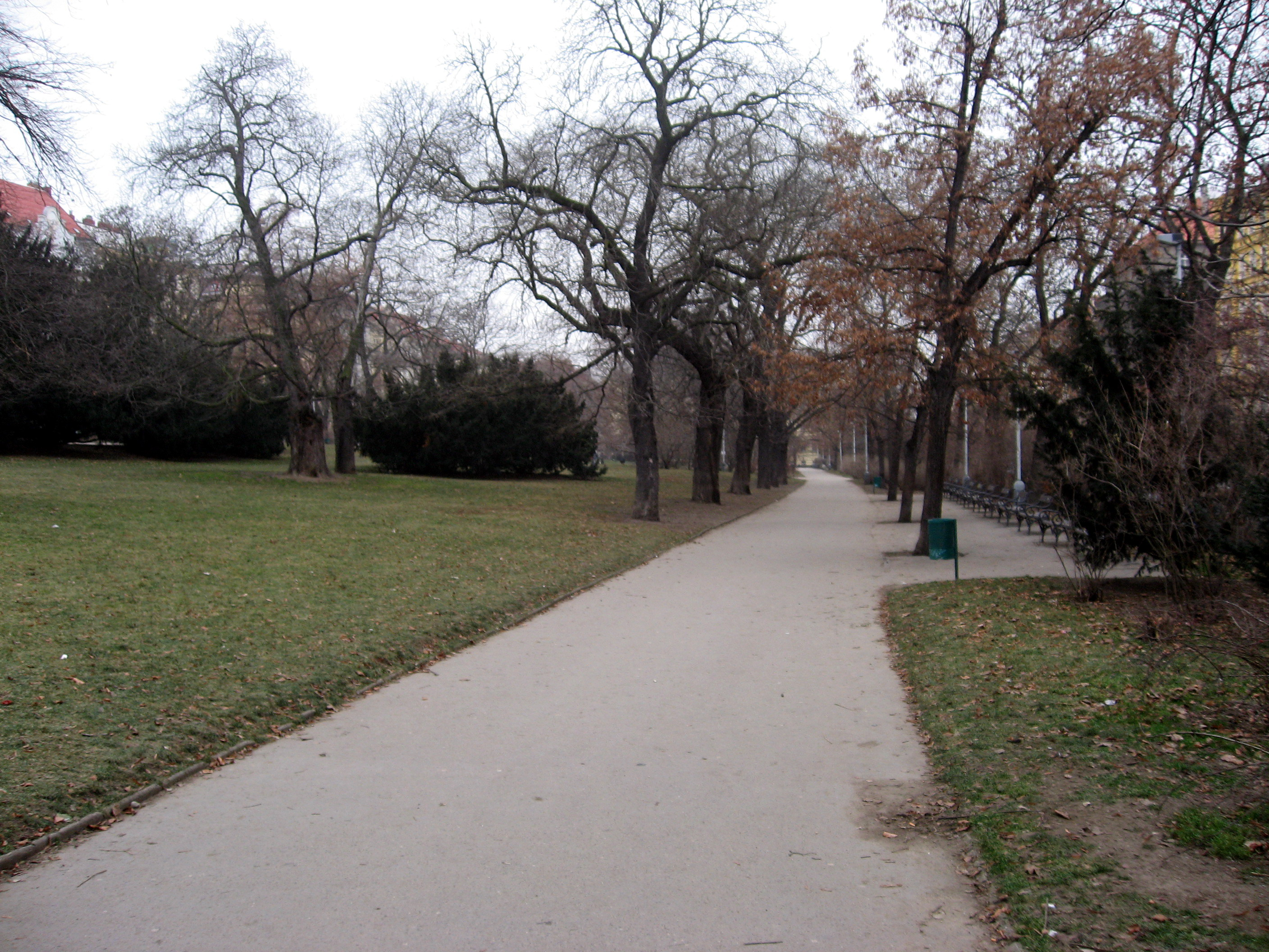 Čechovy sady